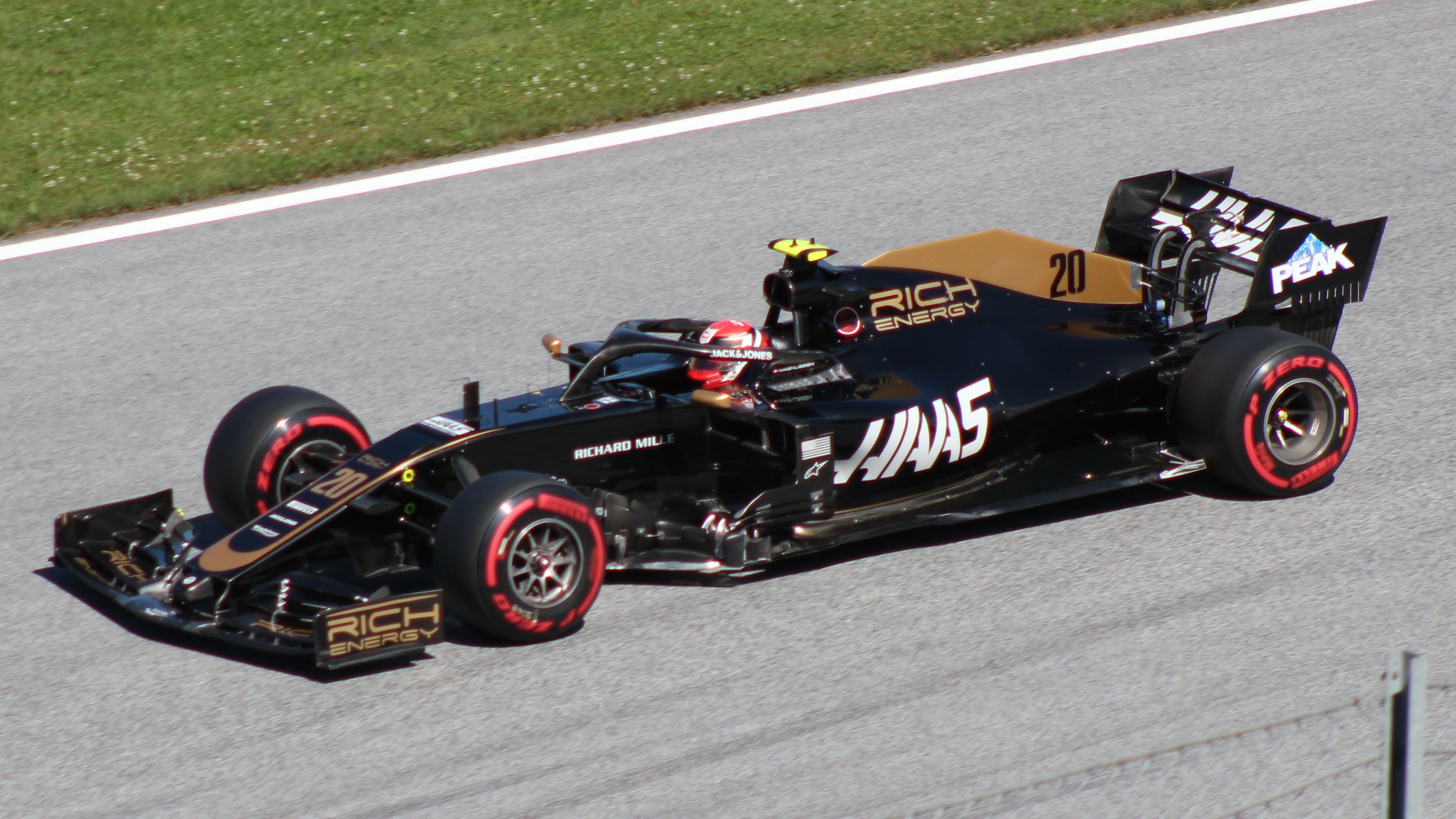 Magnussen beim Rennwochenende in Österreich 2019